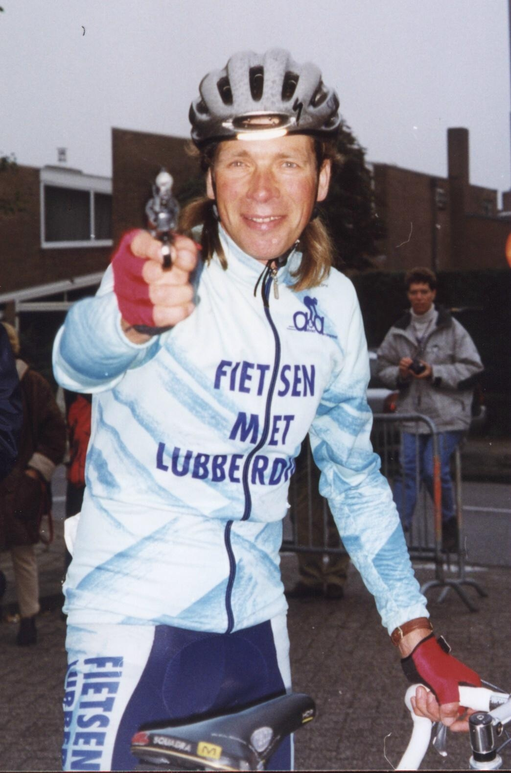 Henk Lubberding (Voorst, 4 augustus 1953) is een Nederlands oud-wielrenner. -- Henk Lubberding "schiet" zijn eigen Lubberding Classic op gang.